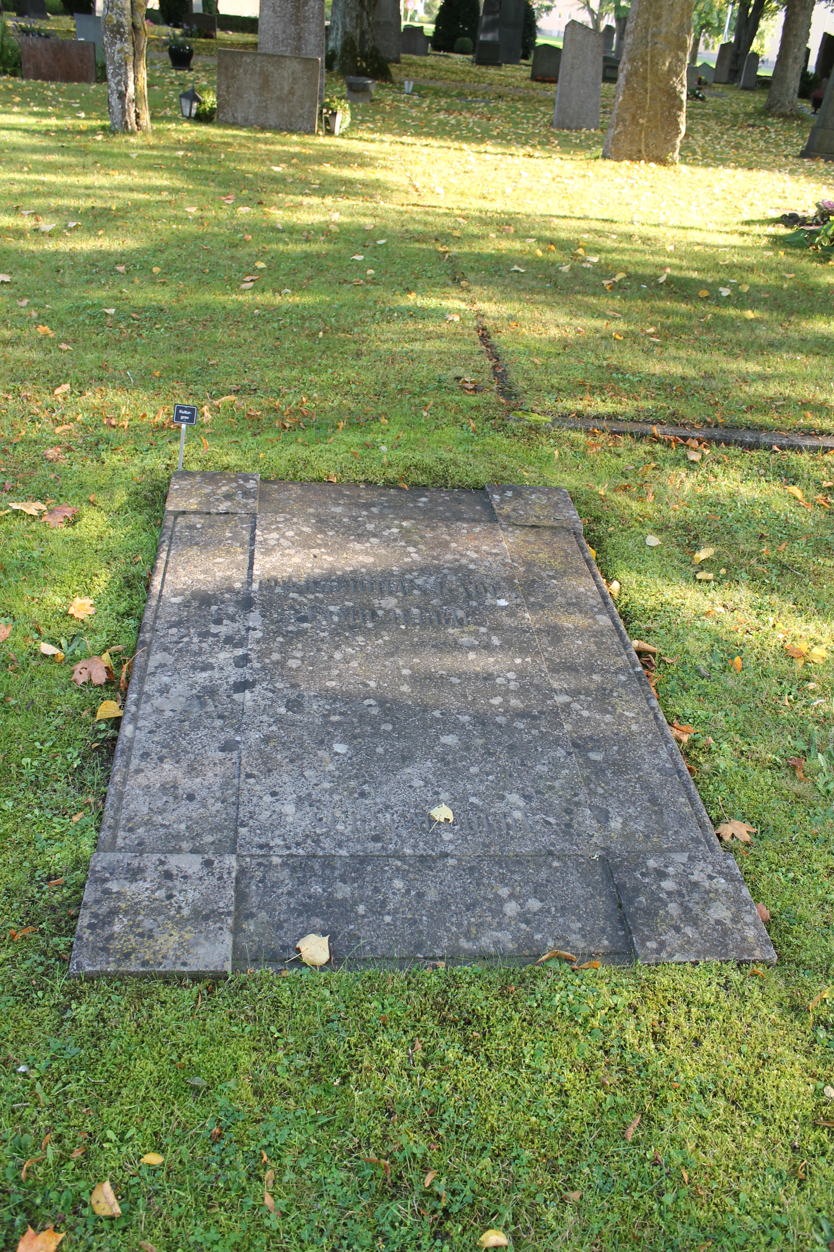 Project Visby